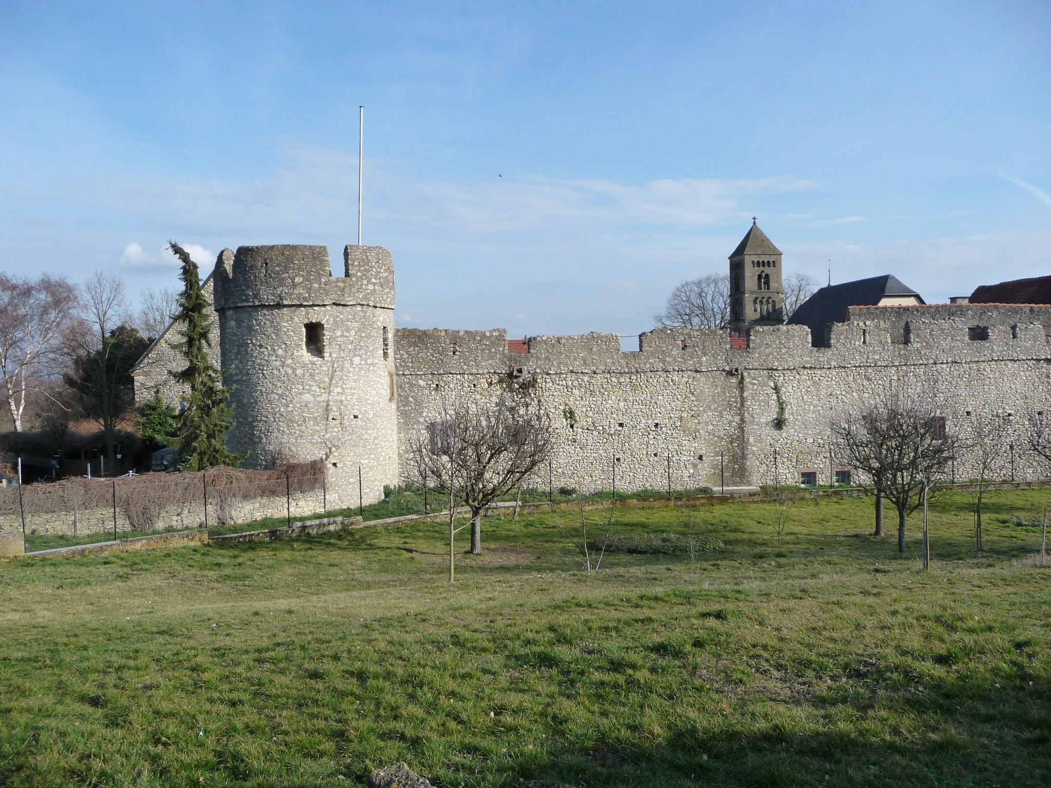 Stadtmauer von Dalsheim in Rheinland-Pfalz